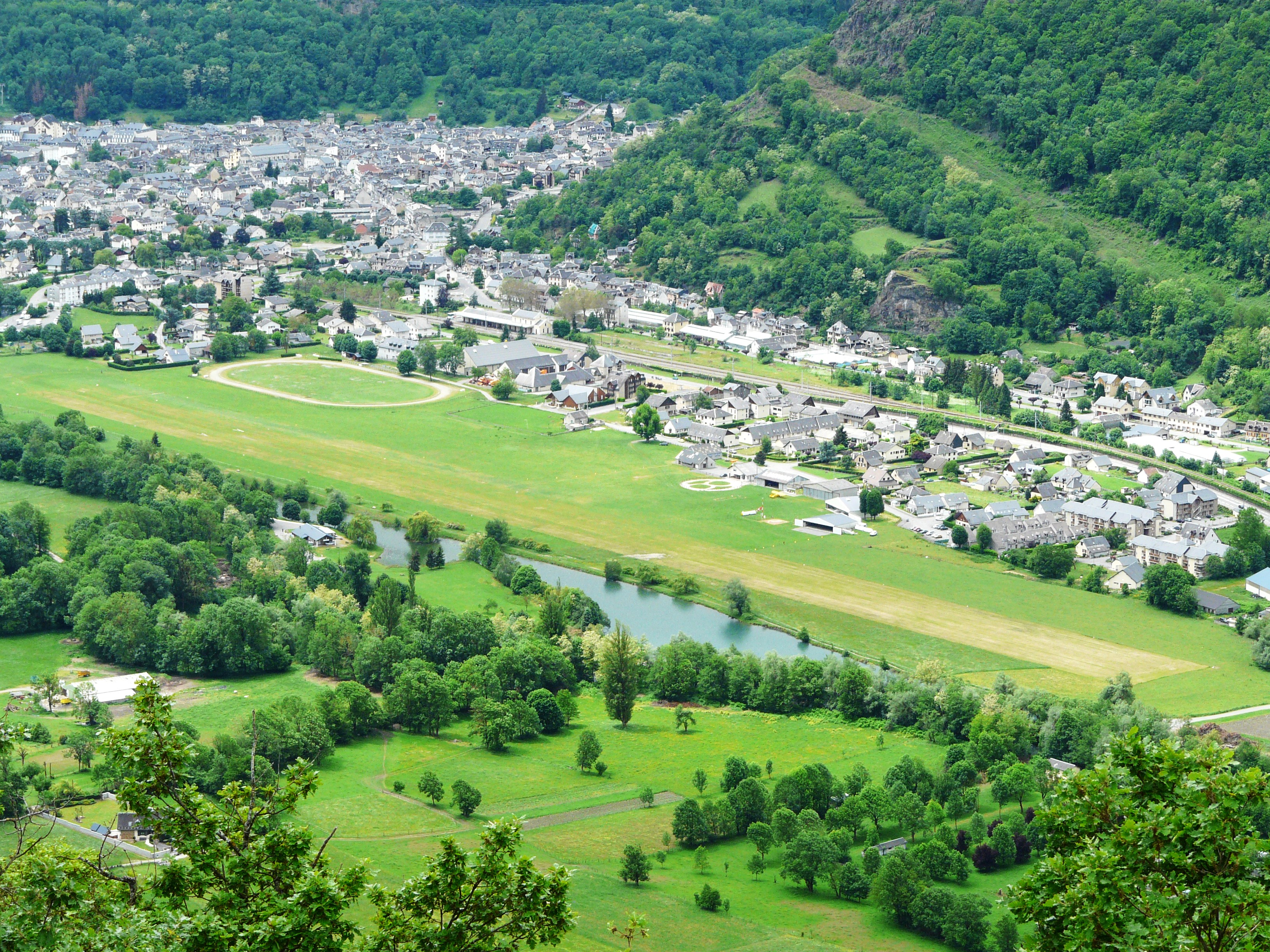 L'aérodrome, la piste ovale du cynodrome, la ligne de chemin de fer avec la gare de Luchon, et le lac de Badech, Bagnères-de-Luchon dans la vallée de Luchon, Haute-Garonne, France.